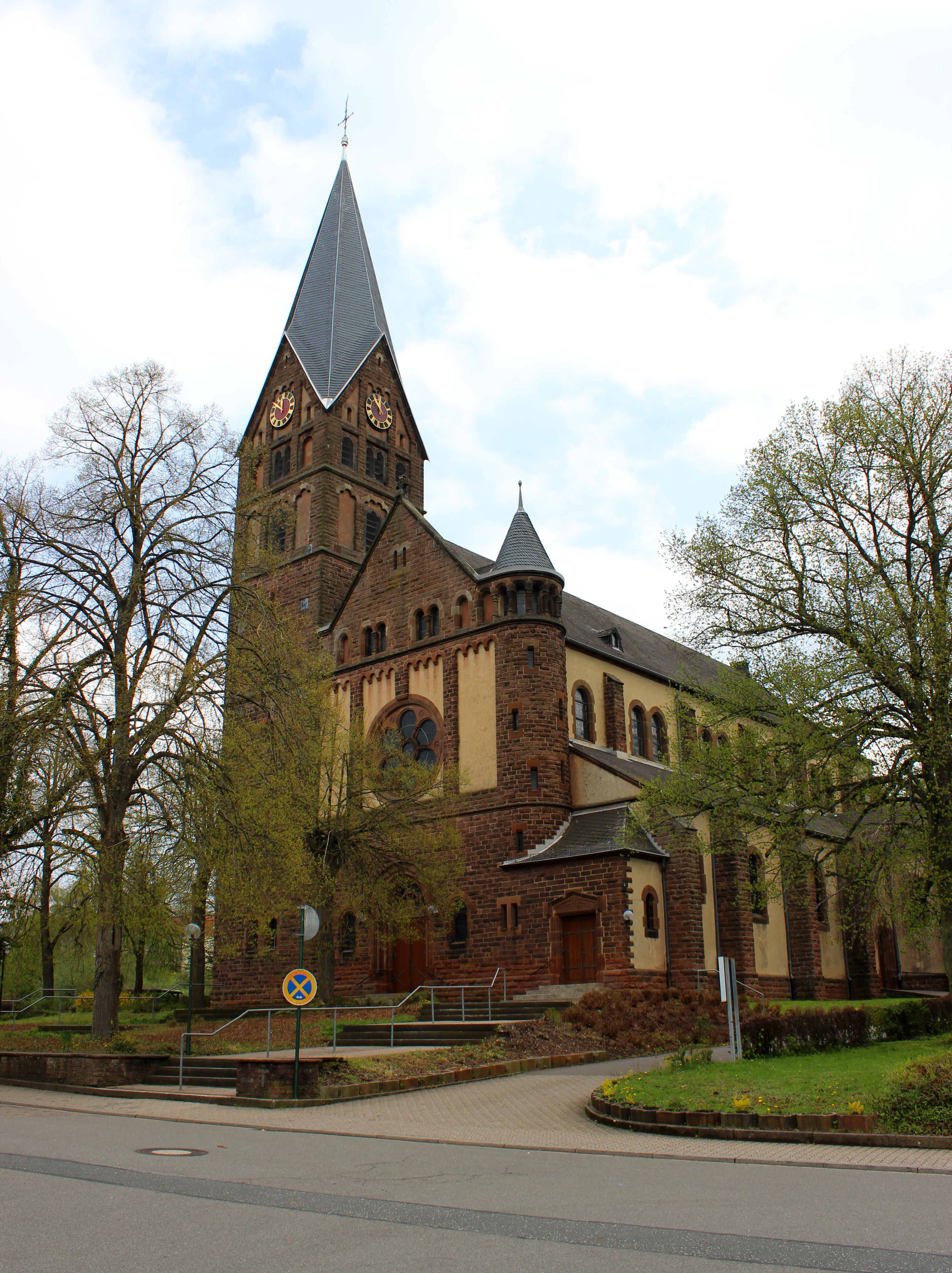 Die katholische Pfarrkirche St. Maria Magdalena in Hüttigweiler, einem Ortsteil der Gemeinde Illingen, Landkreis Neunkirchen, Saarland